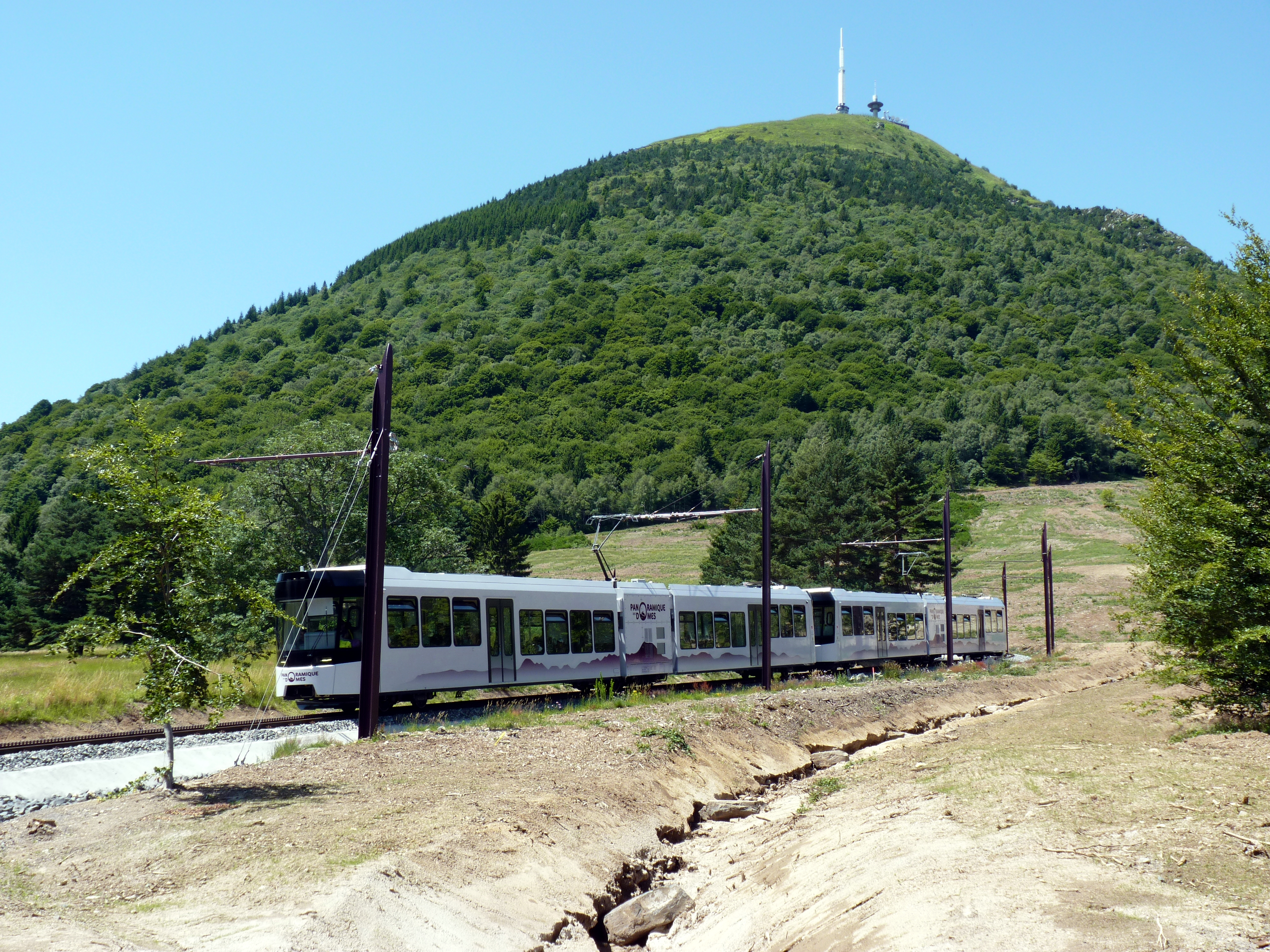 Le Panoramique des Domes mis en service depuis le 28 juin 2012